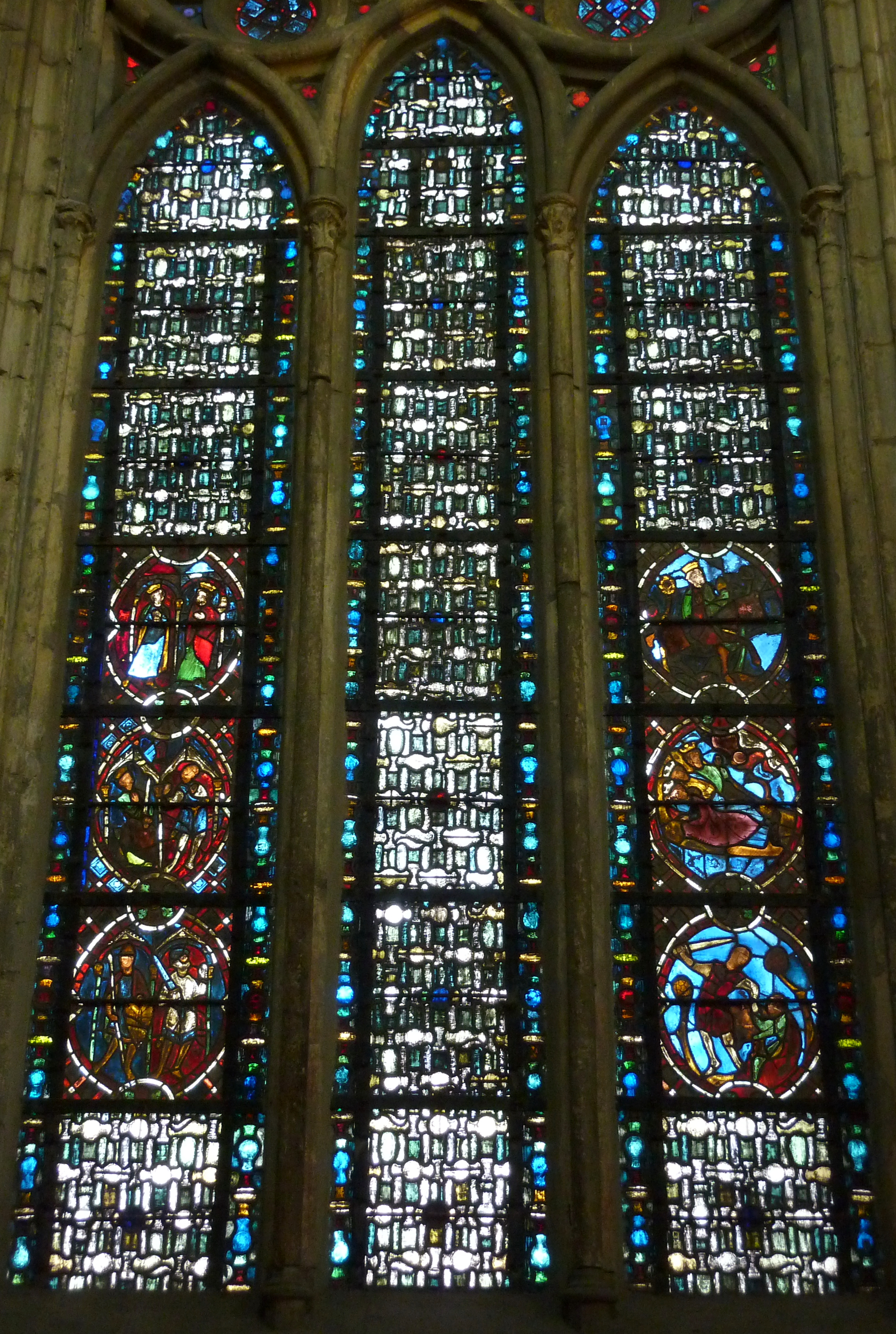 Kirche Sainte-Anne in Gassicourt, einem Stadtteil von Mantes-la-Jolie im Département Yvelines (Île de France), Bleiglasfenster des nördlichen Querhauses (13. Jh.) mit Szenen der Kindheit Jesu